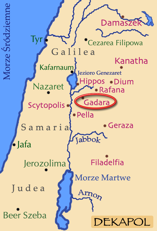 Mapka Dekapolu z zaznaczoną Gadarą.